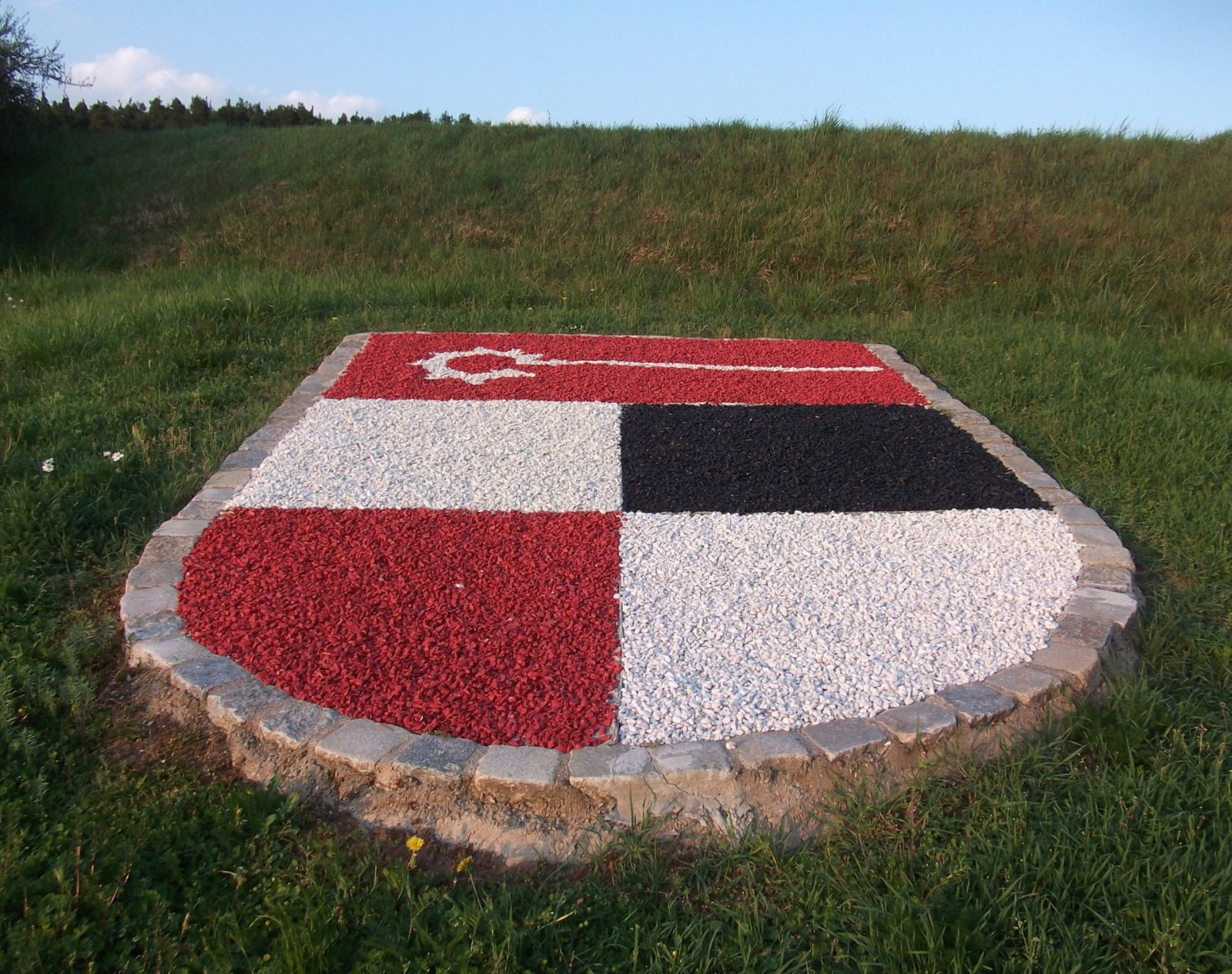 Pleinfelder Stadt-Wappen